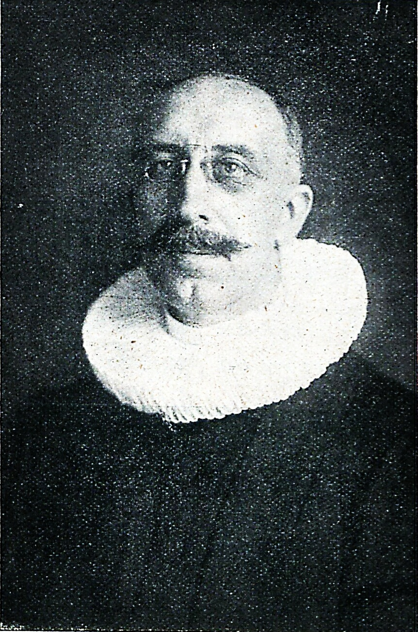 Pastor der neuen Luthergemeinde.